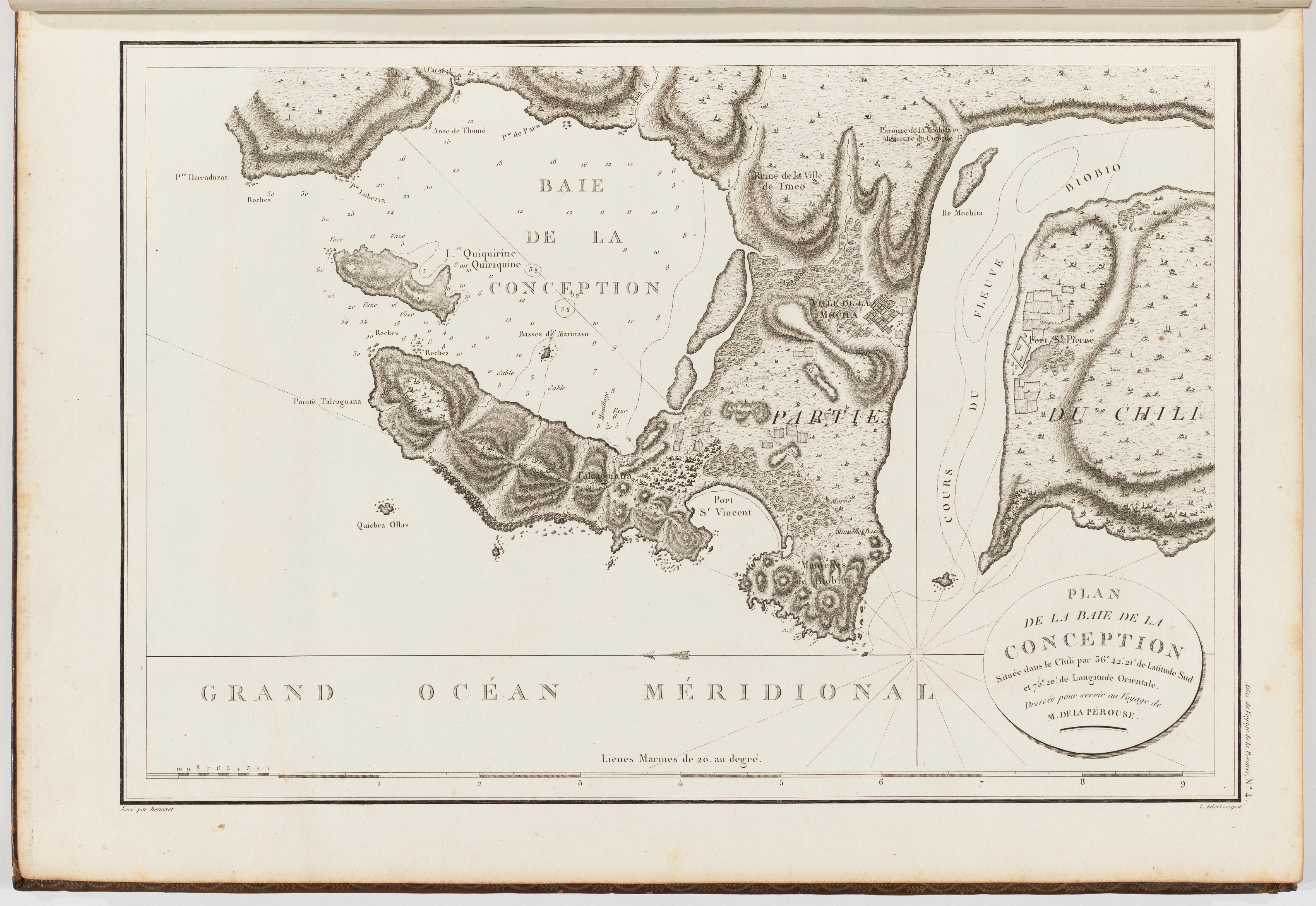 Voyage de La Pérouse autour du monde /publié conformément au décret du 22 avril 1791, et rédigé par L.A. Milet-Mureau.